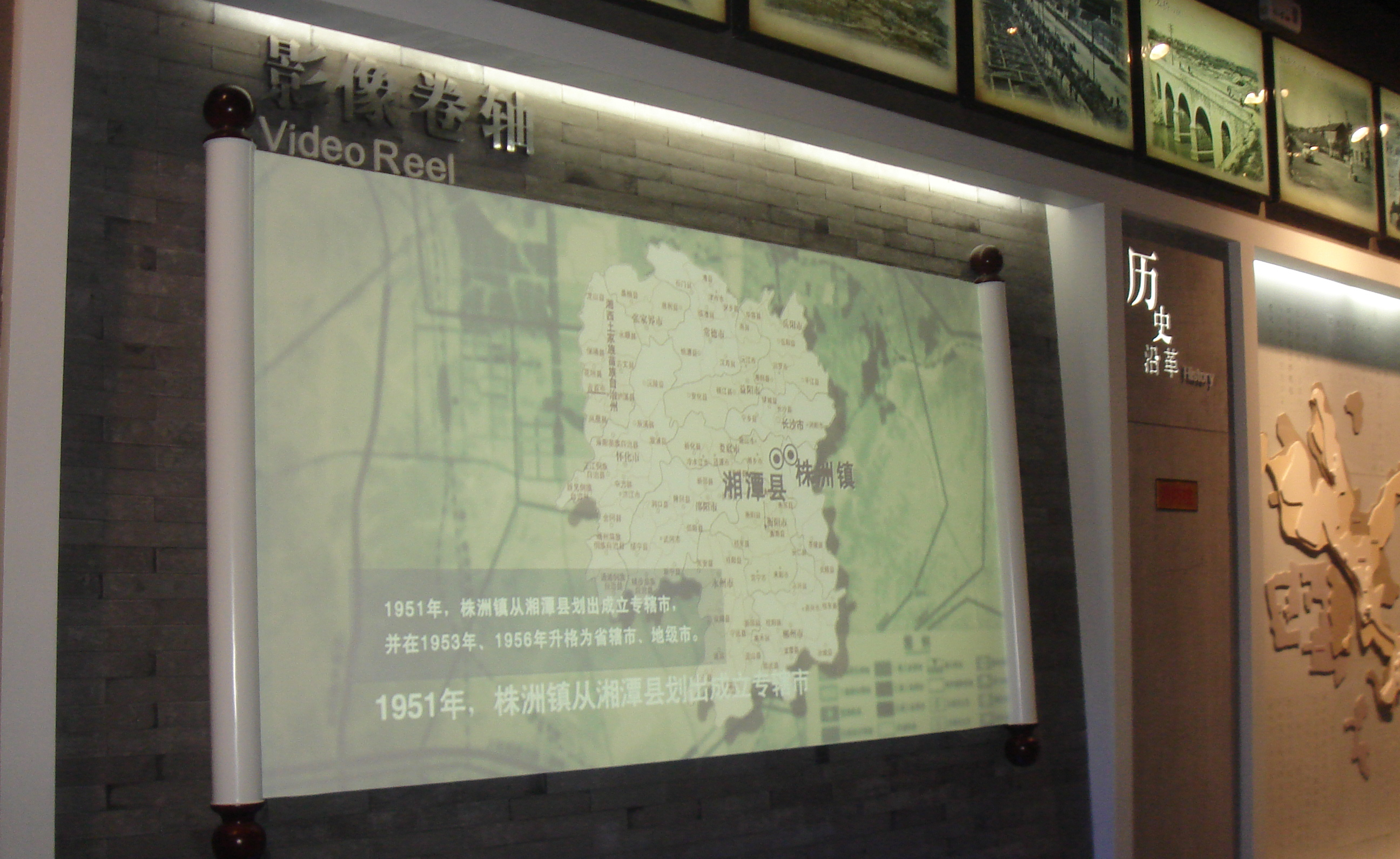 株洲市规划展览馆2楼设有历史沿革相关展示